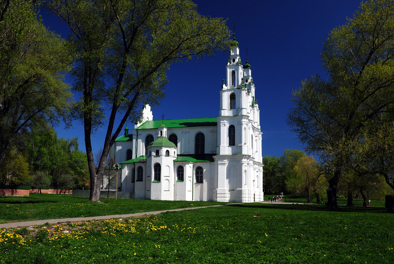 Беларуская (тарашкевіца): Сафійскі сабор. г. Полацак This is a photo of Belarusian heritage monument. Reference number: 210Г000606 ( WLM)